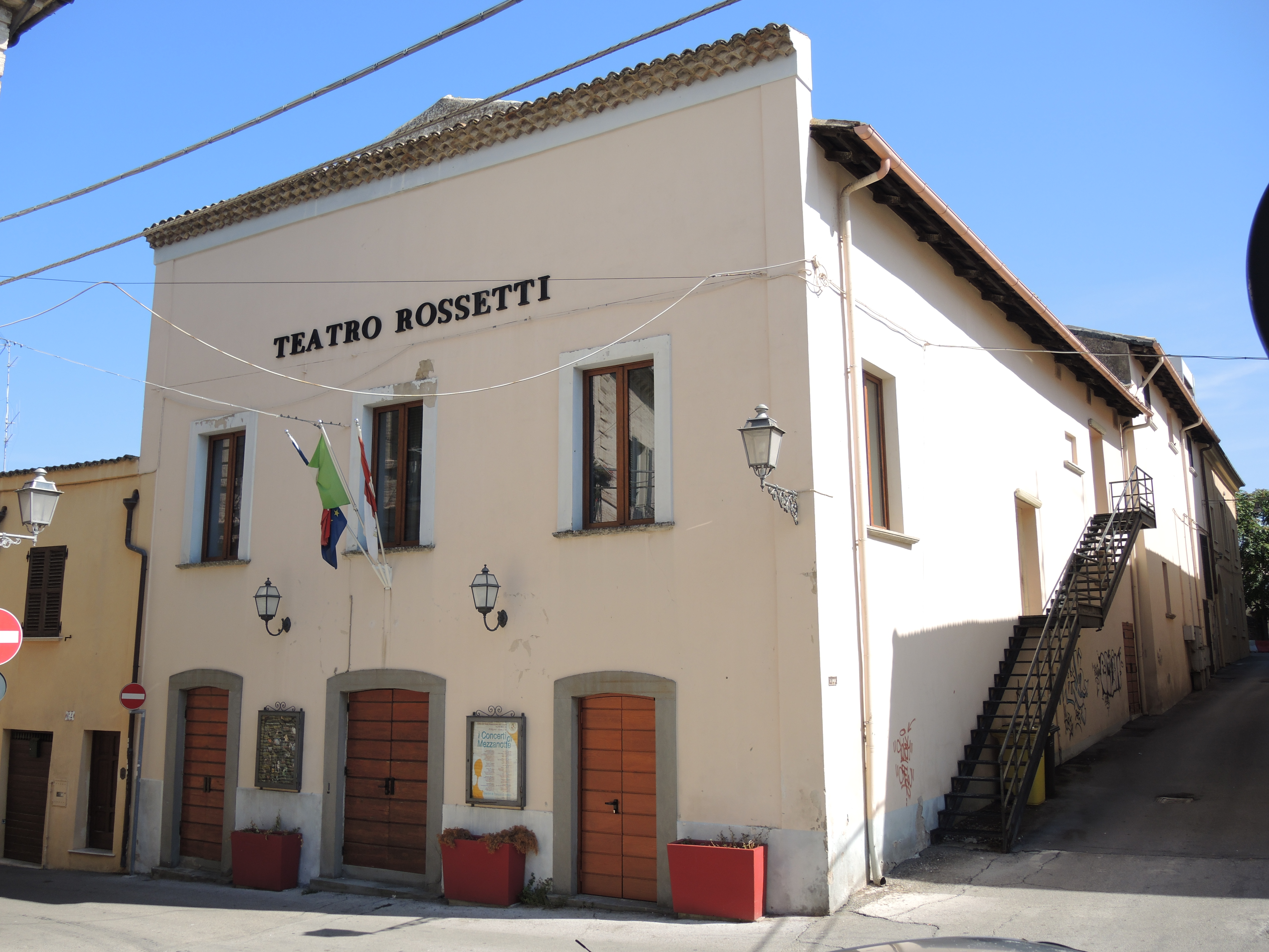 Teatro Rossetti This is a photo of a monument which is part of cultural heritage of Italy.